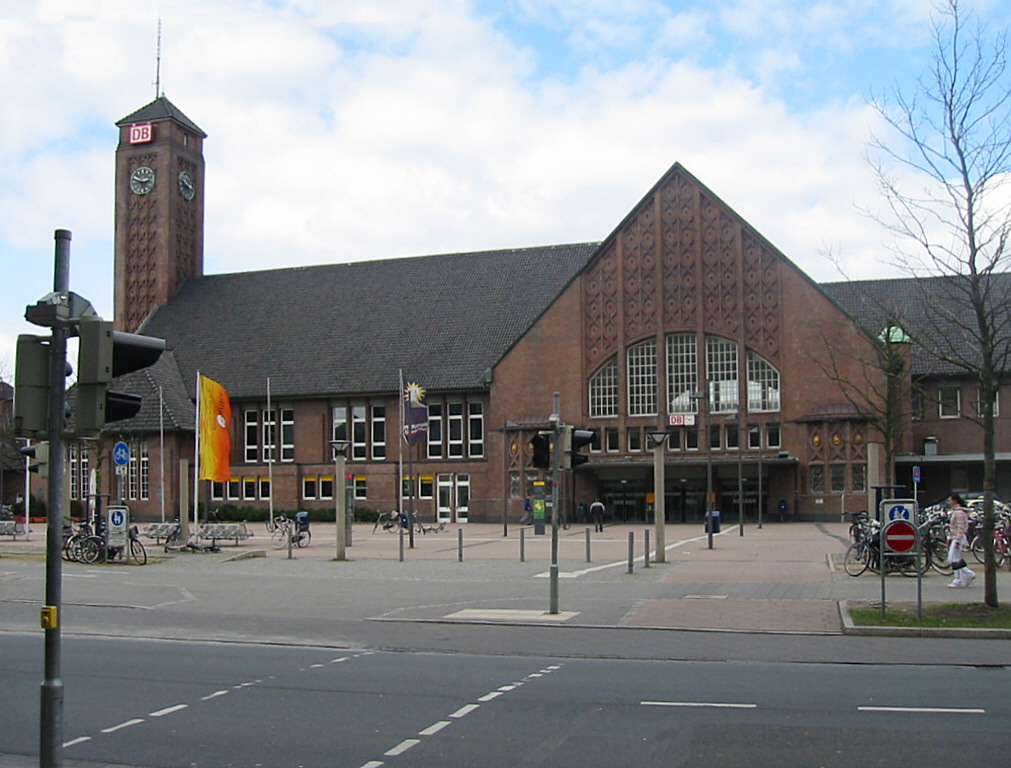 Oldenburg Hauptbahnhof Südseite